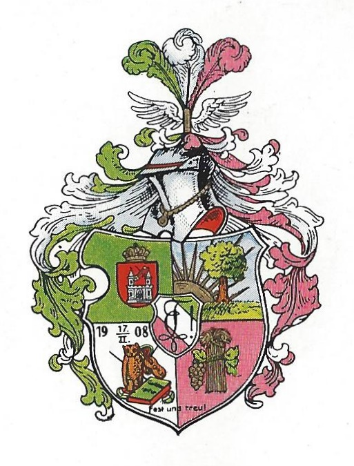 Studentenwappen des Vereins Deutscher Studierender Kolonisten zu Tübingen.